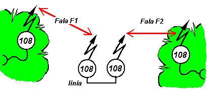 Realizacja retranslacji jako sposób na zwiększenie zasięgu radiostacji UKF małej mocy. Zdjęcie pochodzi ze strony